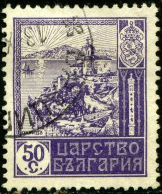 Почтовая марка Болгарии. Освобождение (оккупация) Македонии. Охрид.